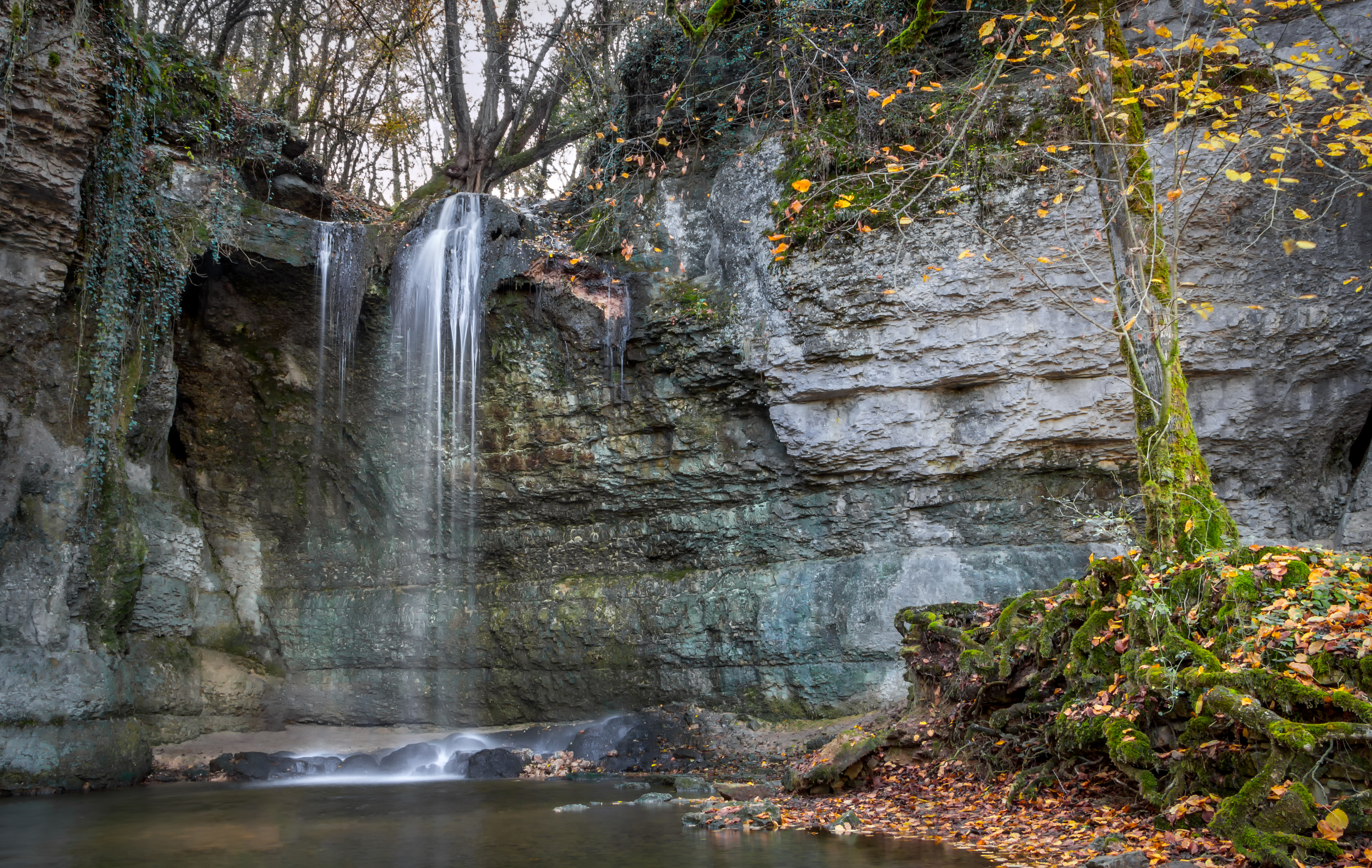 Cascade de la roche, Boulieu, Saint-Baudille-de-la-Tour, Isère, France.